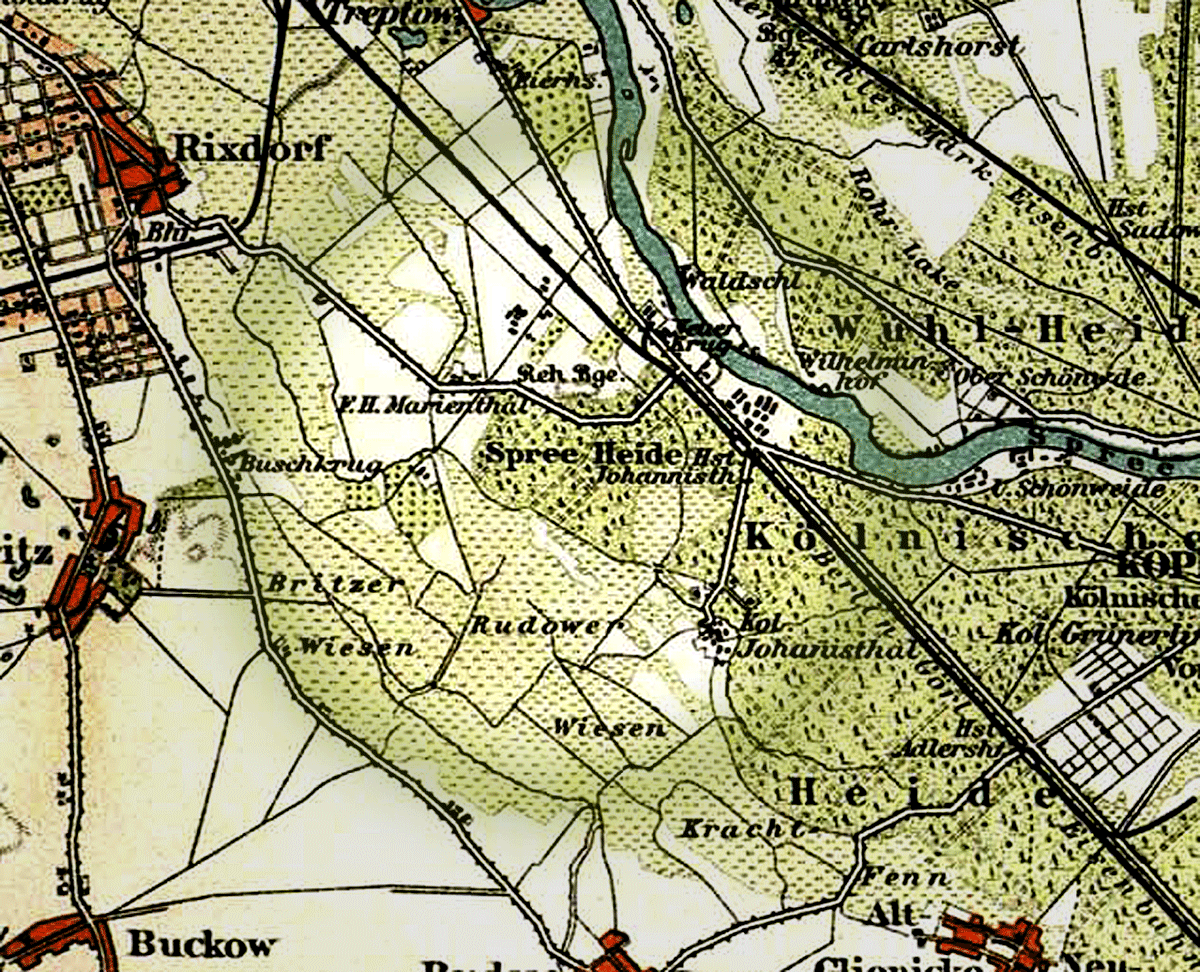 Berlin und Umgebung aus Brockhaus 14. Auflage * Format: 27,5 x 21,5 cm (nur der Plan) * Maßstab: 1:110.000 Der Titel steht über dem Plan. Unten in einem eingesetzten Rechteck sind Längengrade angegeben: "31° Östl. Länge v. Ferro = 13°20' Östl. v. Greenwich" dazu am linken Blattrand der Breitengrad: "52°30'". Im Rahmen unten links steht: "Brockhaus' Konversations-Lexikon. 14. Aufl."; in der Mitte der Maßstab mit einer Maßstabsleiste über 6 km; links neben dem Maßstab die Erklärung der Verkehrsmittel (Pferdebahn, Dampfstrassenbahn); rechts: "F.A. Brockhaus' Geogr.-artist. Anstalt,Leipzig.".